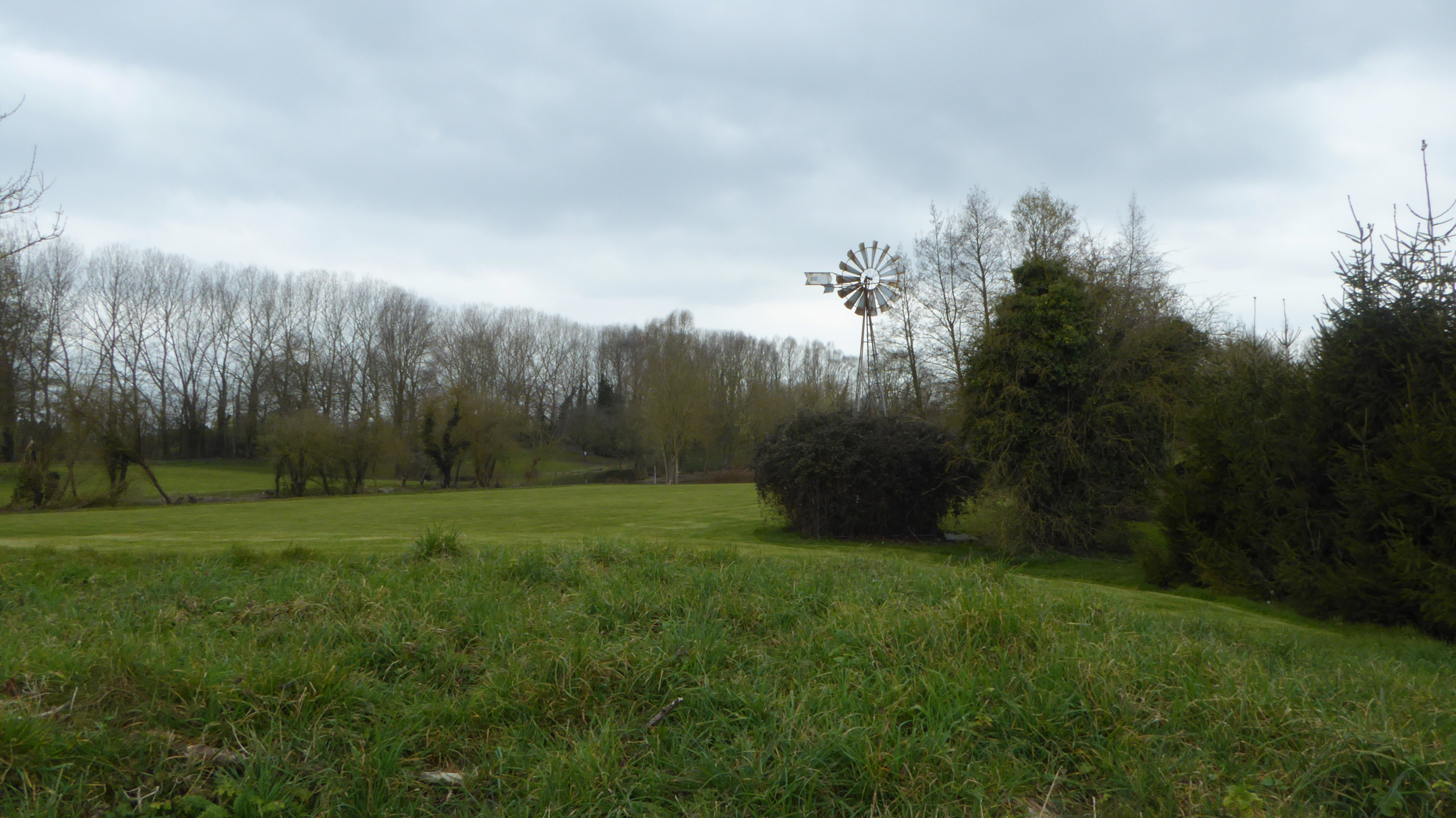 Le Vert Parc Golf Club Illies Nord Nord-Pas-de-Calais-Picardie France.